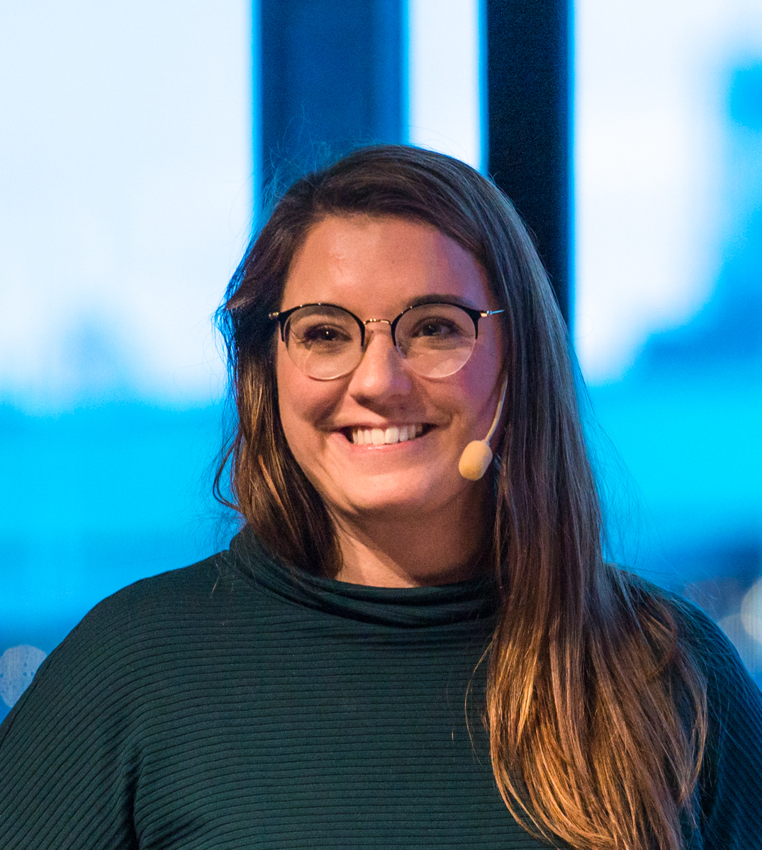 Anna Herdy under debattsamtalet "En ny politisk karta - Sverige fram till 2022" på Kulturhuset Stadsteatern i Stockholm den 25 september 2018. (